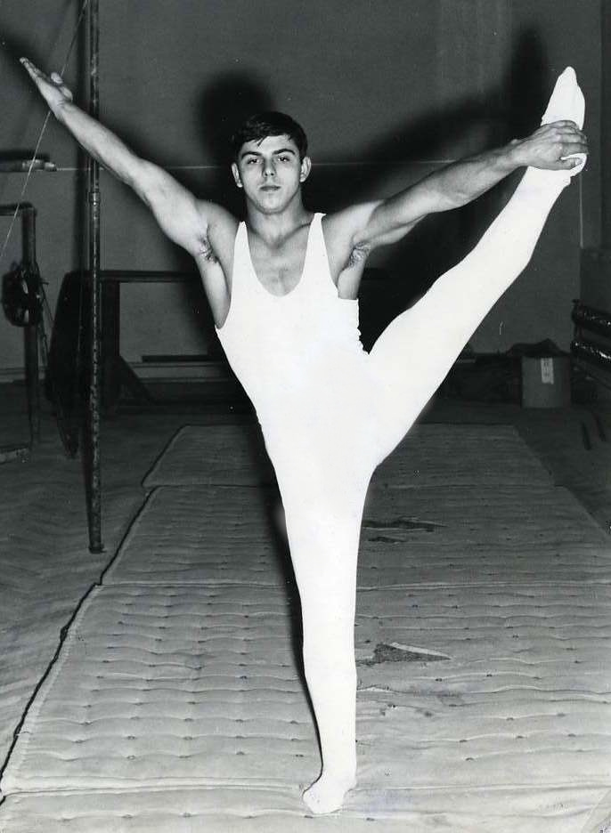 Nehasil Vladislav - sportovní gymnastika